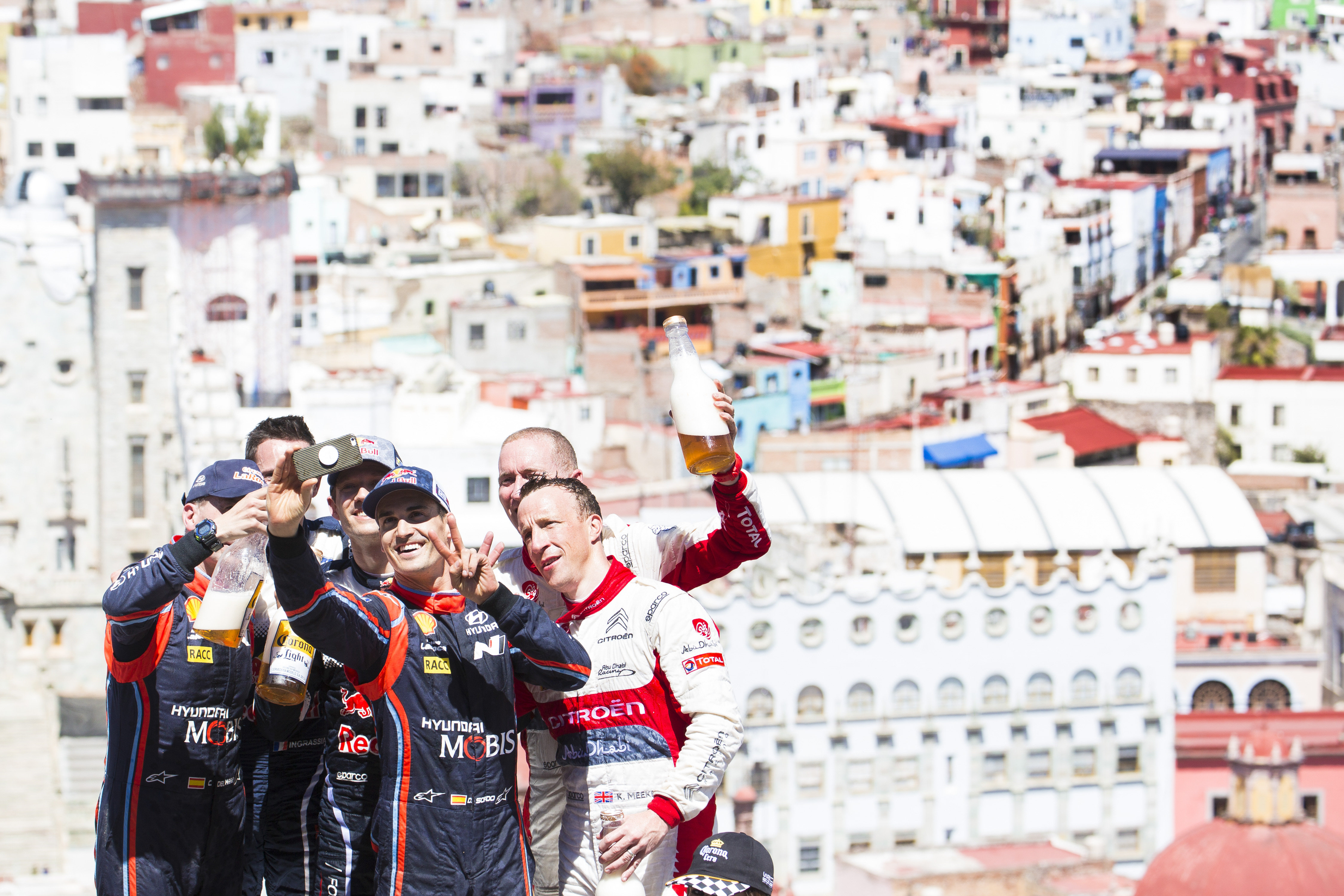 Dani Sordo i Kris Meeke podczas Rajdu Meksyk 2018